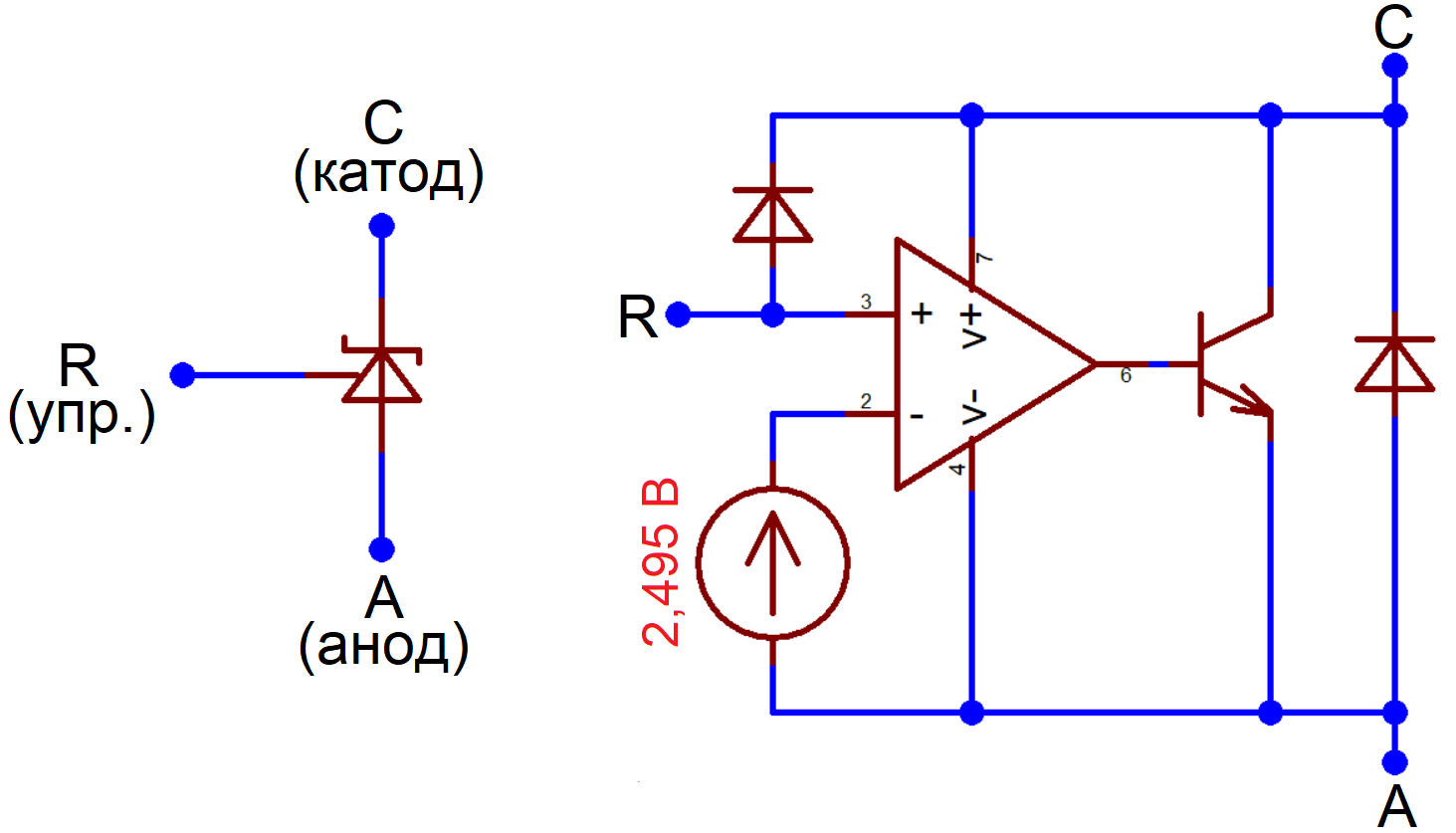 Условное графическое обозначение и блок-схема TL431